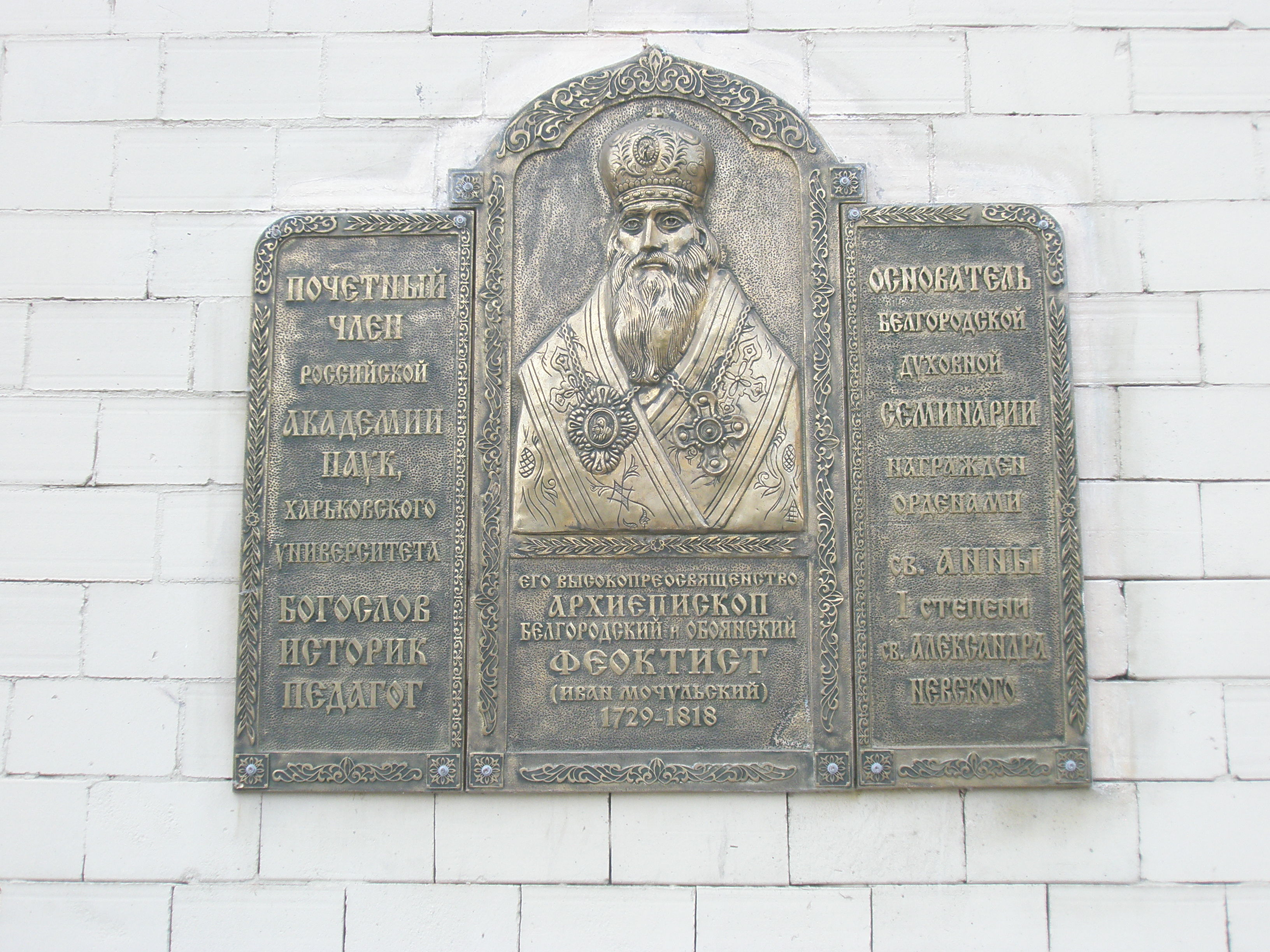 Архиепископ Белгородский и Обоянский Феоктист (Иван Мочульский) - основатель Белгородской Духовной семинарии. Мемориальная доска на здании Белгородской семинарии